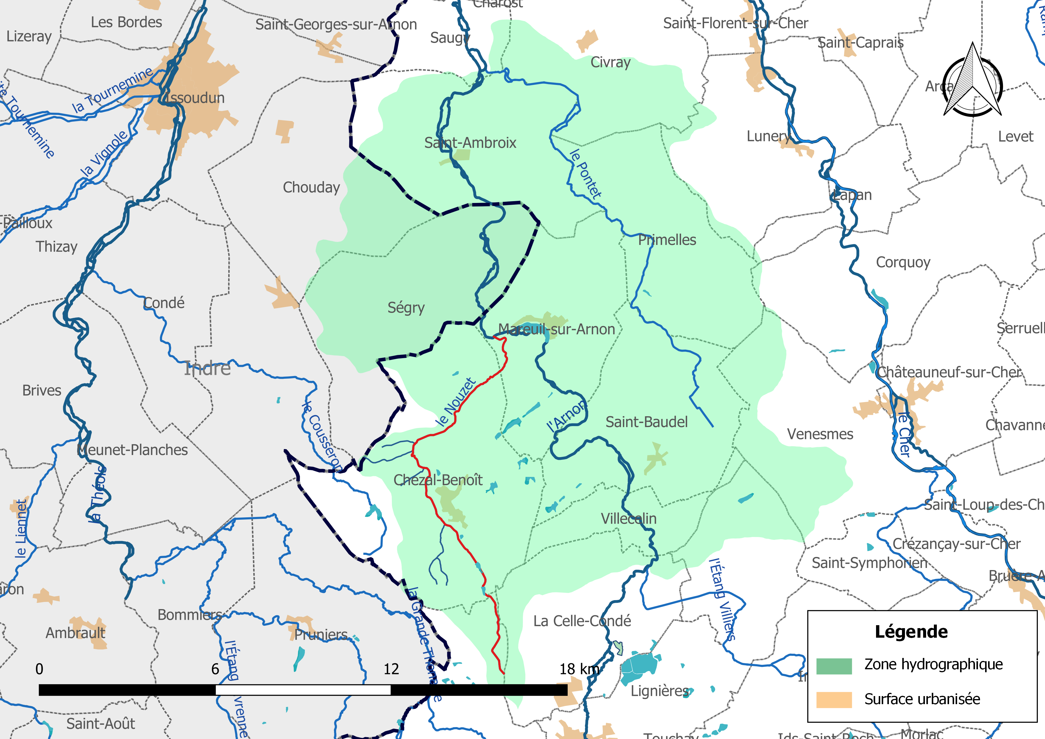 Carte du cours d'eau « le Nouzet » (France) et de la zone hydrographique dans laquelle il s'insère.